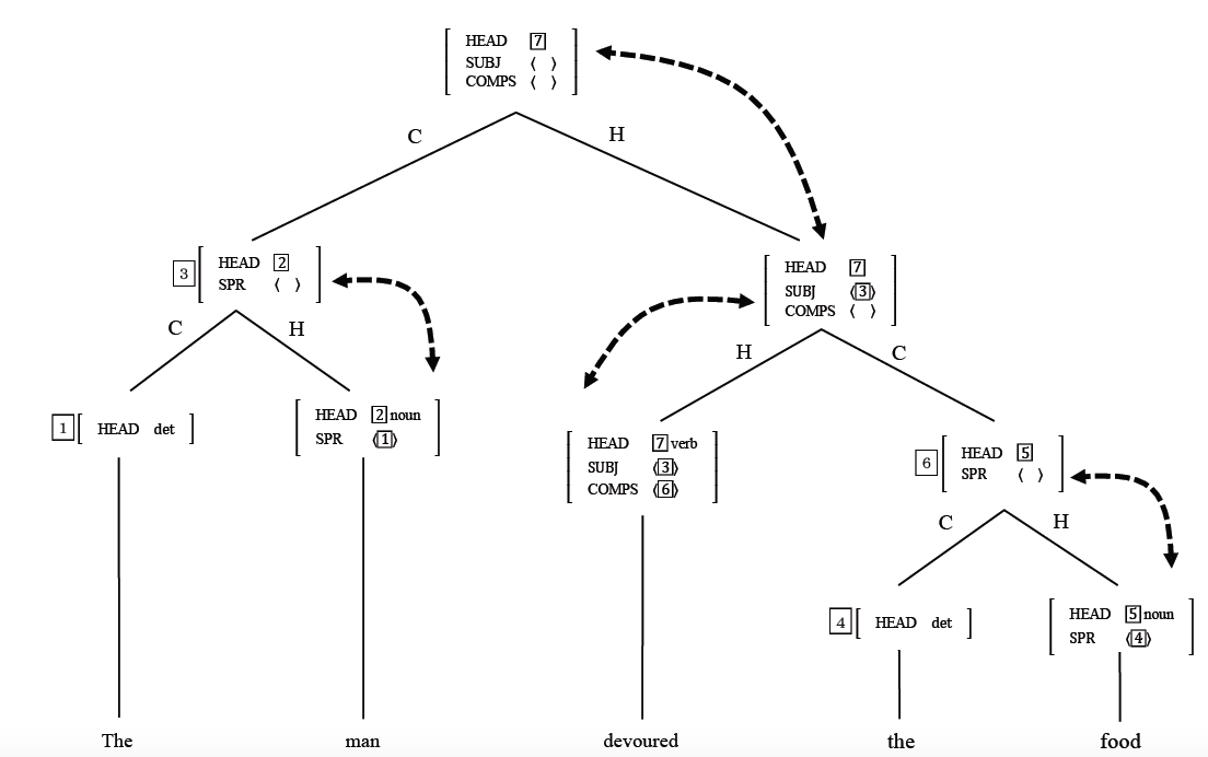 主辞駆動句構造文法におけるヘッドの利用例。